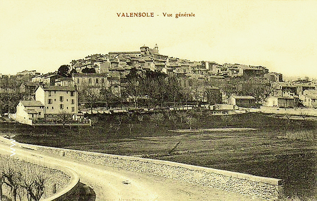 Vue générale du village de Valensole